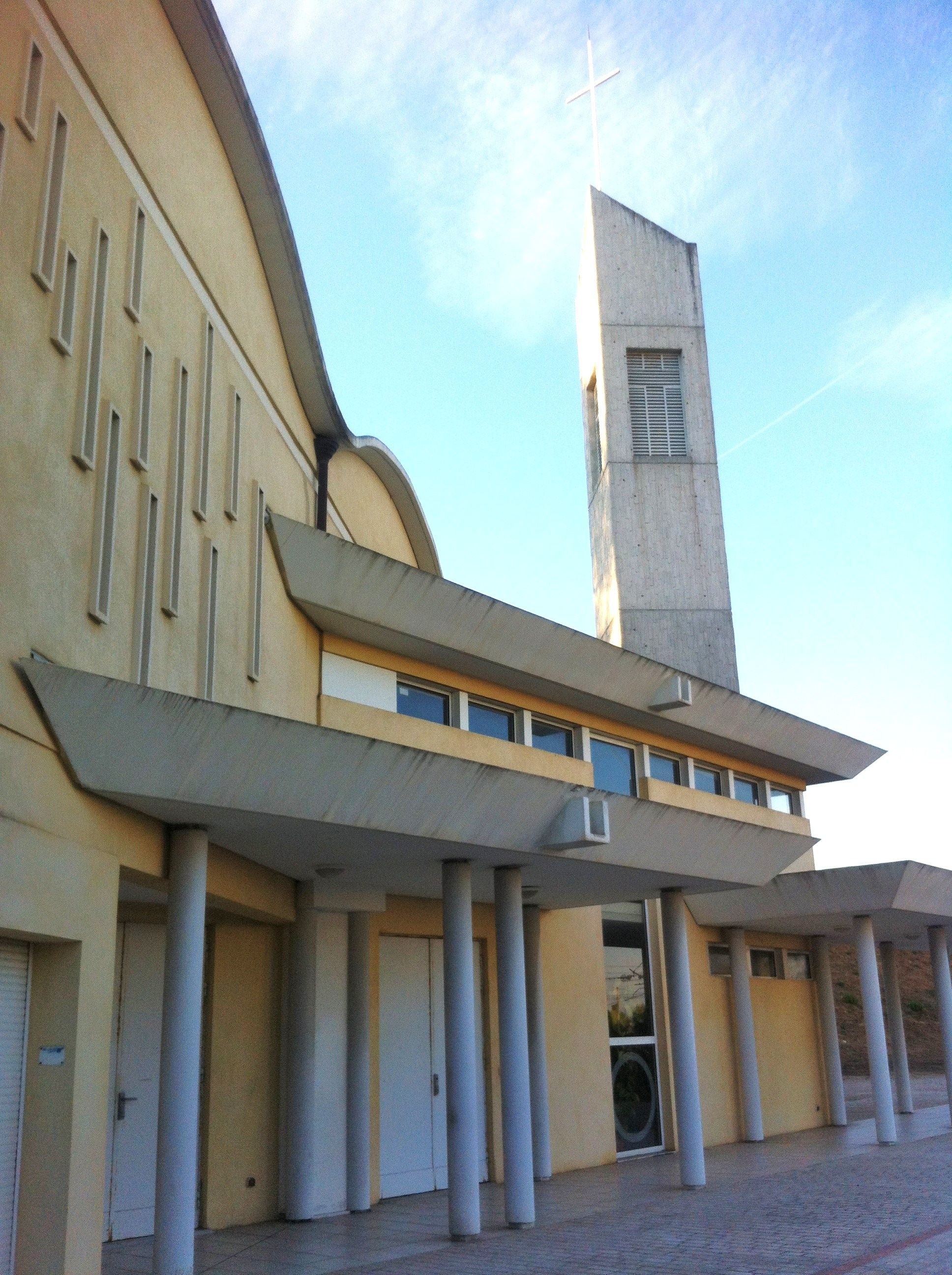 Villeneuve Loubet eglise Saint- Christophe